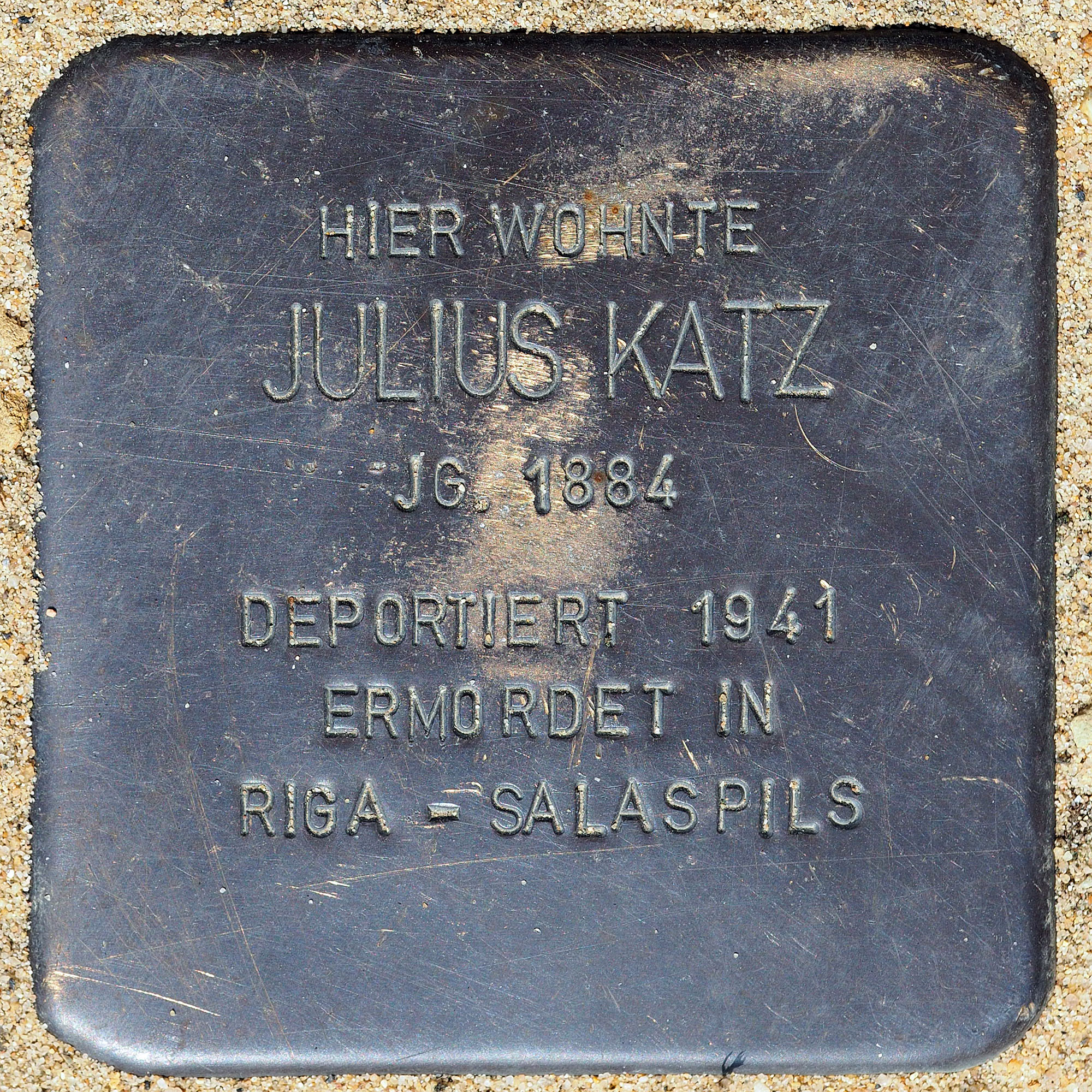 Stolpersteine GV: Katz, Julius